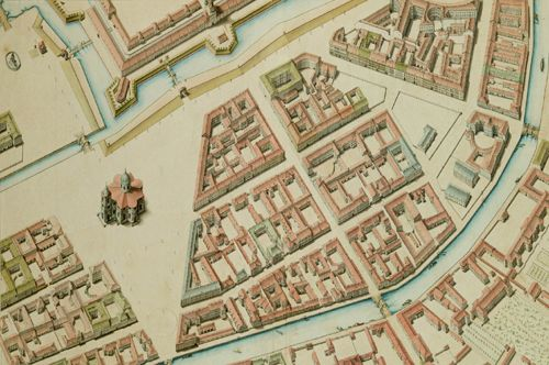 Перспективный план Санкт-Петербурга.